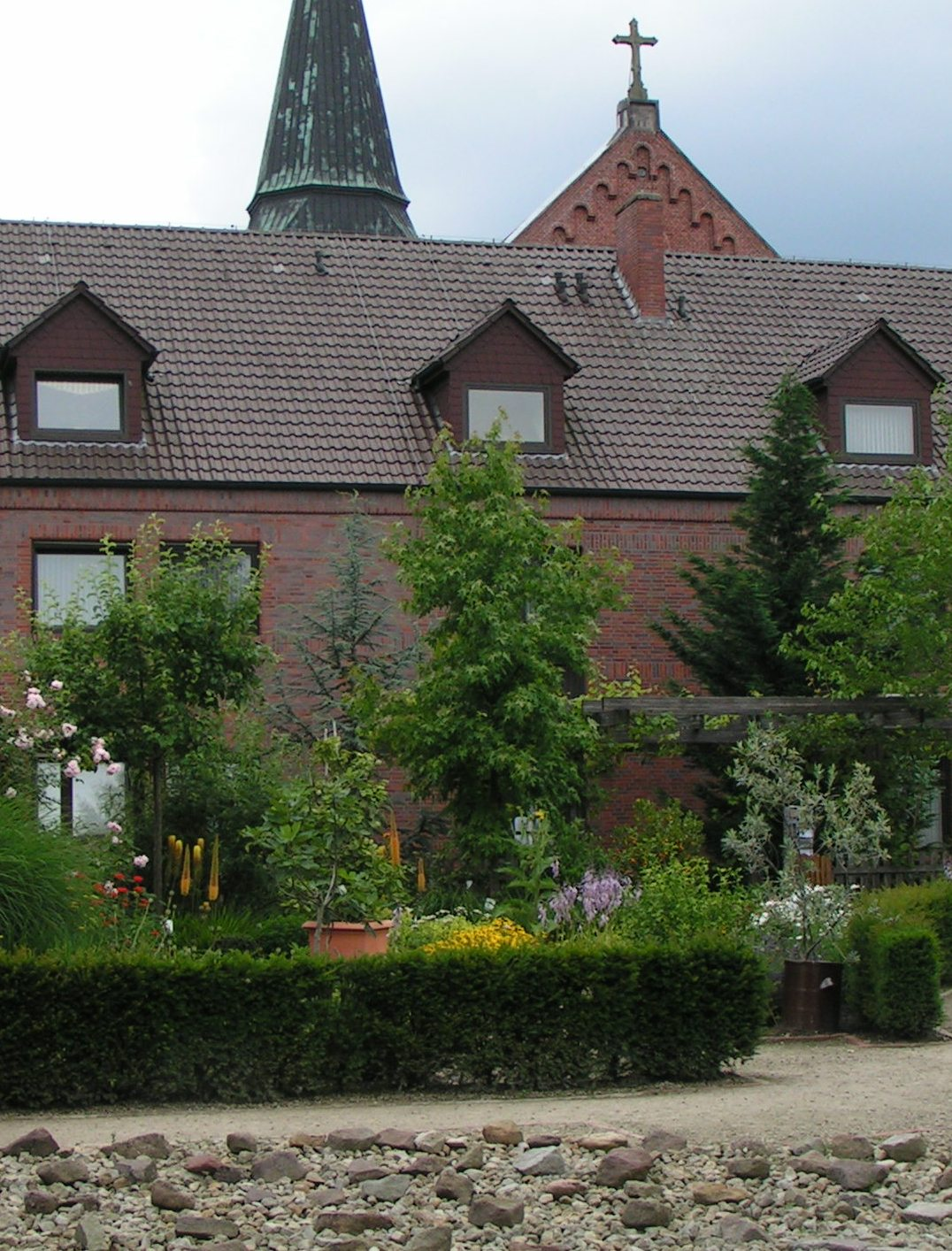 Bibelgarten der katholischen Kirchengemeinde St. Sixtus in Werlte (Emsland)